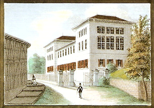 Die Anatomie in Tübingen [Das Anatomieinstitut in Tübingen] (aus Sammelbild, aquarelierte Lithographie, 6 × 8,6 cm, Inventarnummer 619)